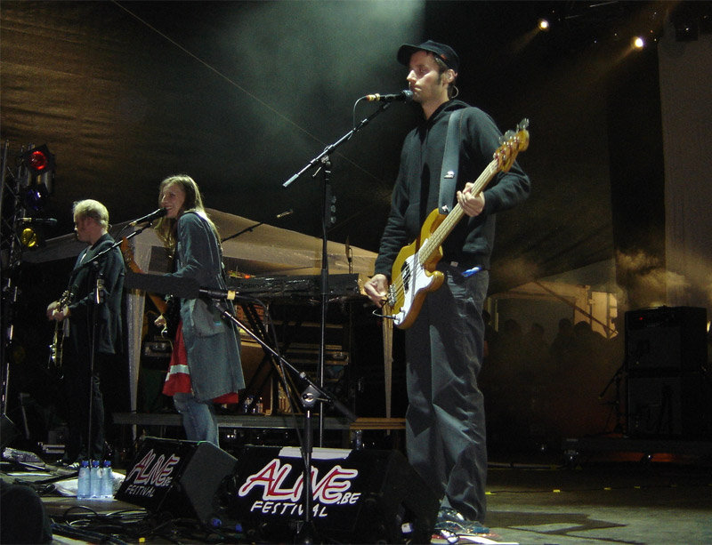 D'Wir sind Helden um Alive 2005